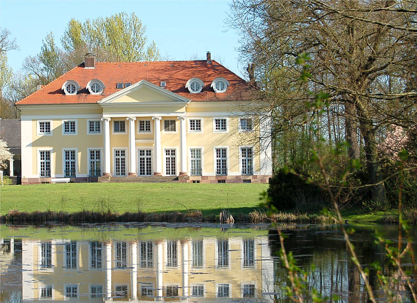 Hofgeismar - Schlösschen Schönburg (Montcherie)